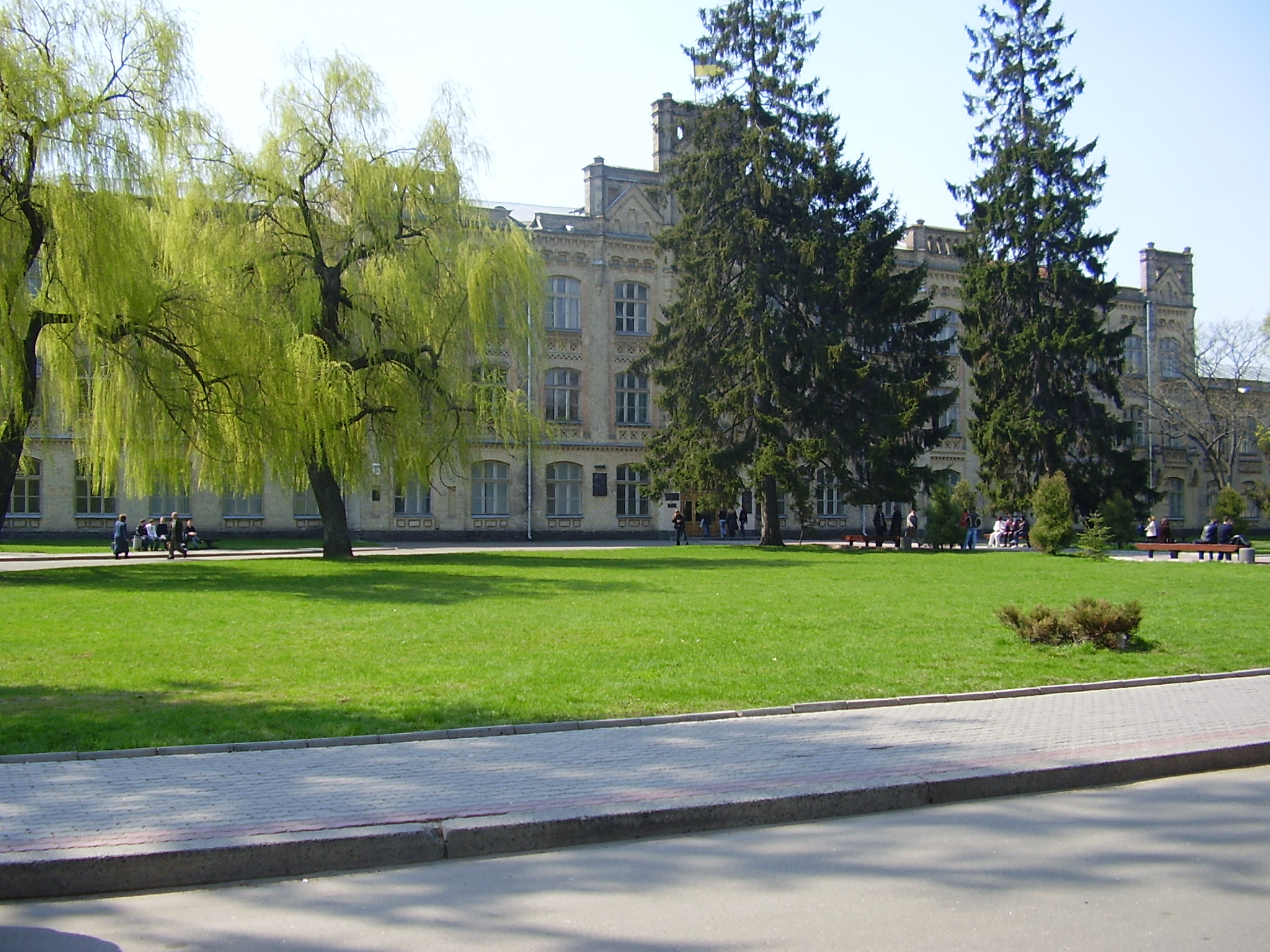 KPI - Building #1, left :: Первый корпус политеха, чуть слева